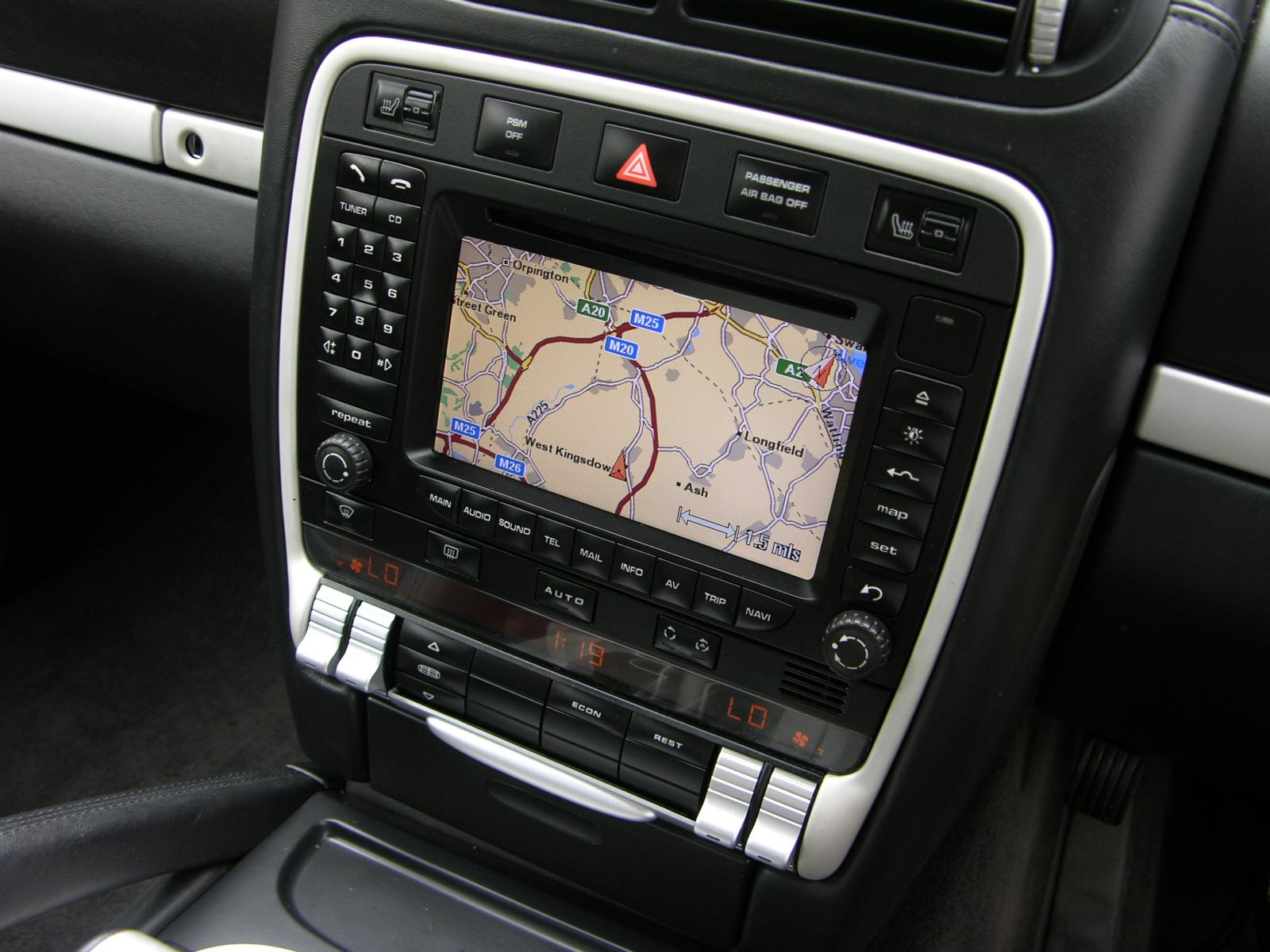 2006 Porsche Cayenne 4.5 Turbo S